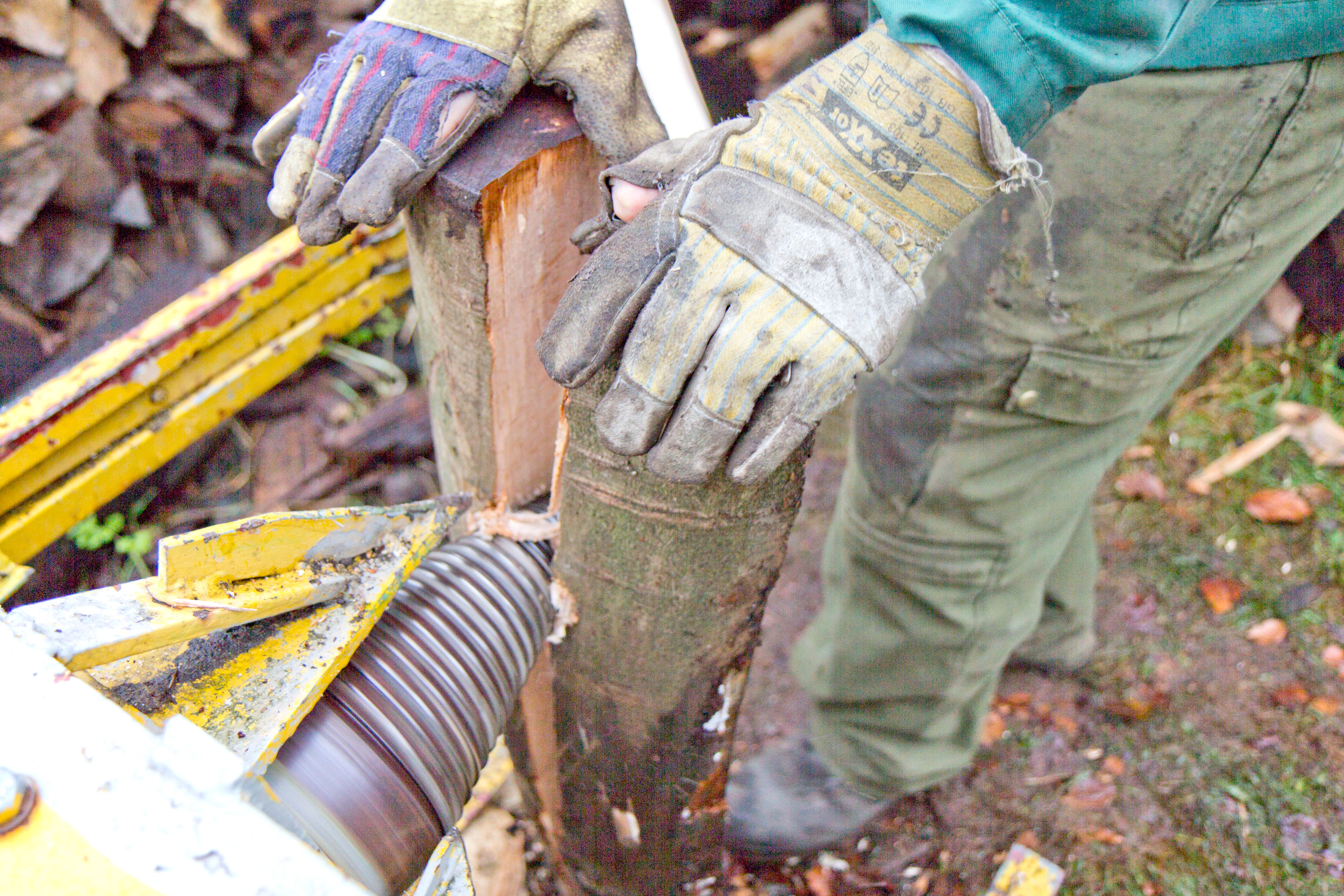 Holzspalter (Kegelspalter) zum Aufspalten von Baumstücken in Holzscheite, zumeist zur Verwendung als Brennholz. Diese funktionieren nach dem Prinzip eines mit einem Gewinde versehenen, konischen Metallkegels, welcher direkt durch die Zapfwelle des Fahrzeugs angetrieben wird. Drückt man nun ein Baumstück gegen die Spitze des sich drehenden Kegels, bohrt dieser sich in das Holz und spaltet es auf, da sich das Holzstück mit dem Gewinde immer weiter auf den breiter werdenden Kegel "zieht".